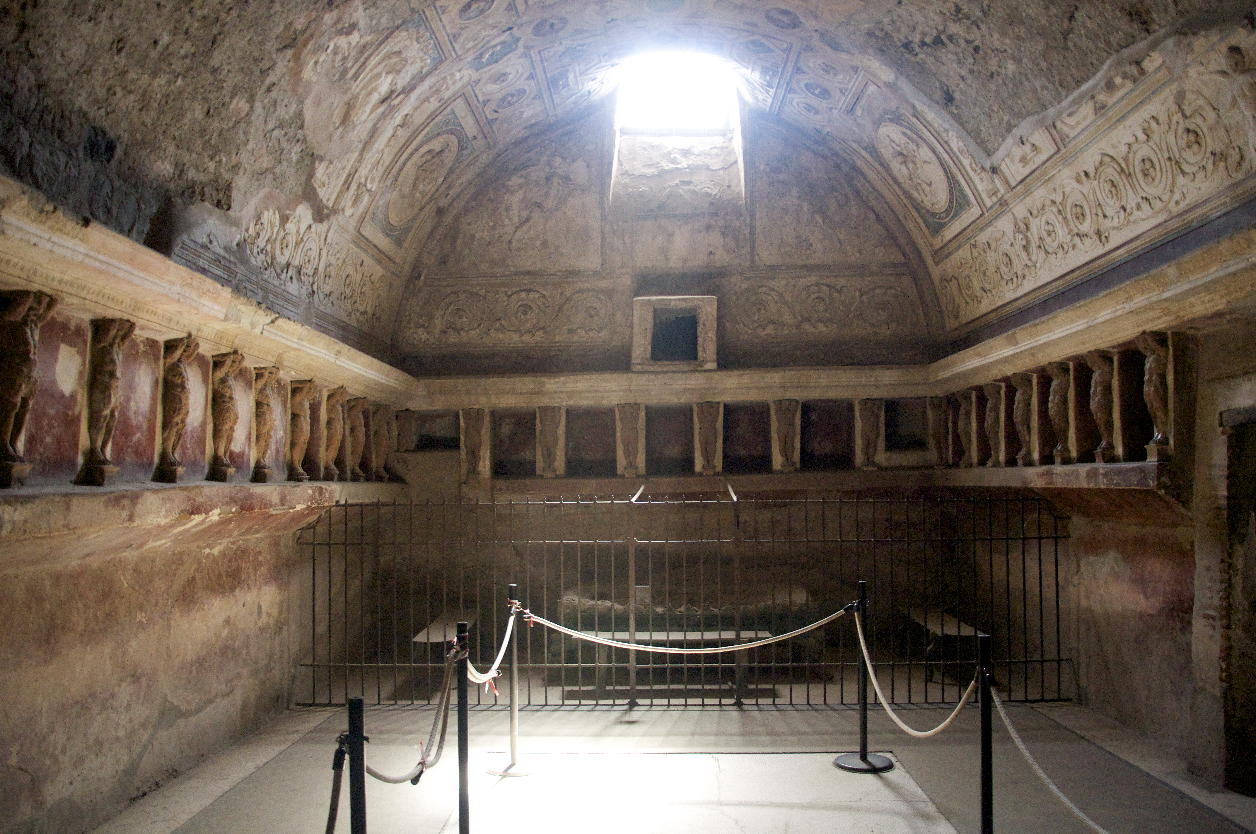 Pompei